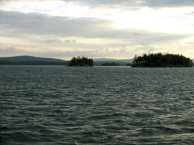 Иовское водохранилище The scenic Iovskoe reservoir on the Murmansk-Karelian borderland.